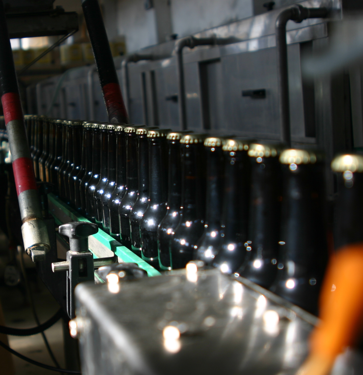 Die Taybeh-Brauerei in Taybeh, Palästina. Object location31° 57′ 20″ N, 35° 17′ 51″ E